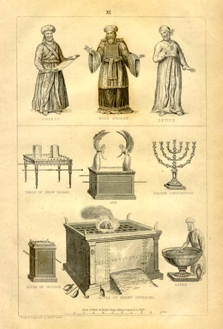 Judaica